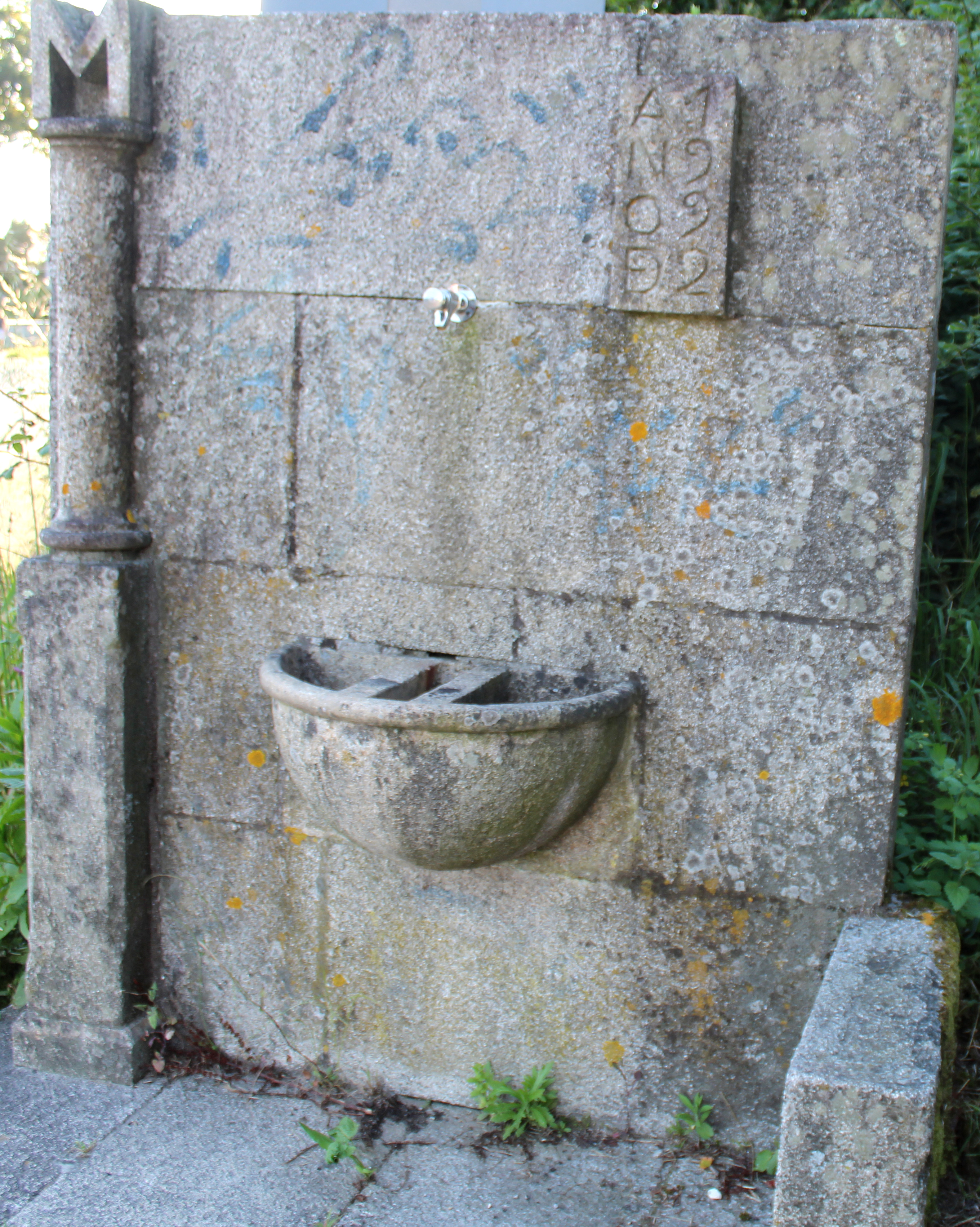 Fonte comunal na Texosa, parroquia de Mañufe, Gondomar